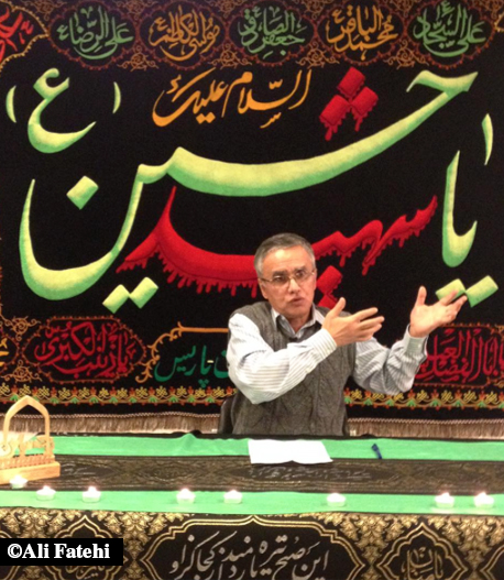 سخنرانی تقی رحمانی عاشورای ۱۳۹۴، جمعیت رحمان-پاریس